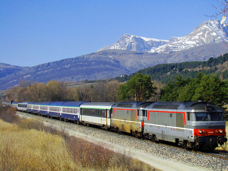 Train couchette Paris - Briançon vu en plein coeur des hautes-alpes avec la BB.67475 en tête